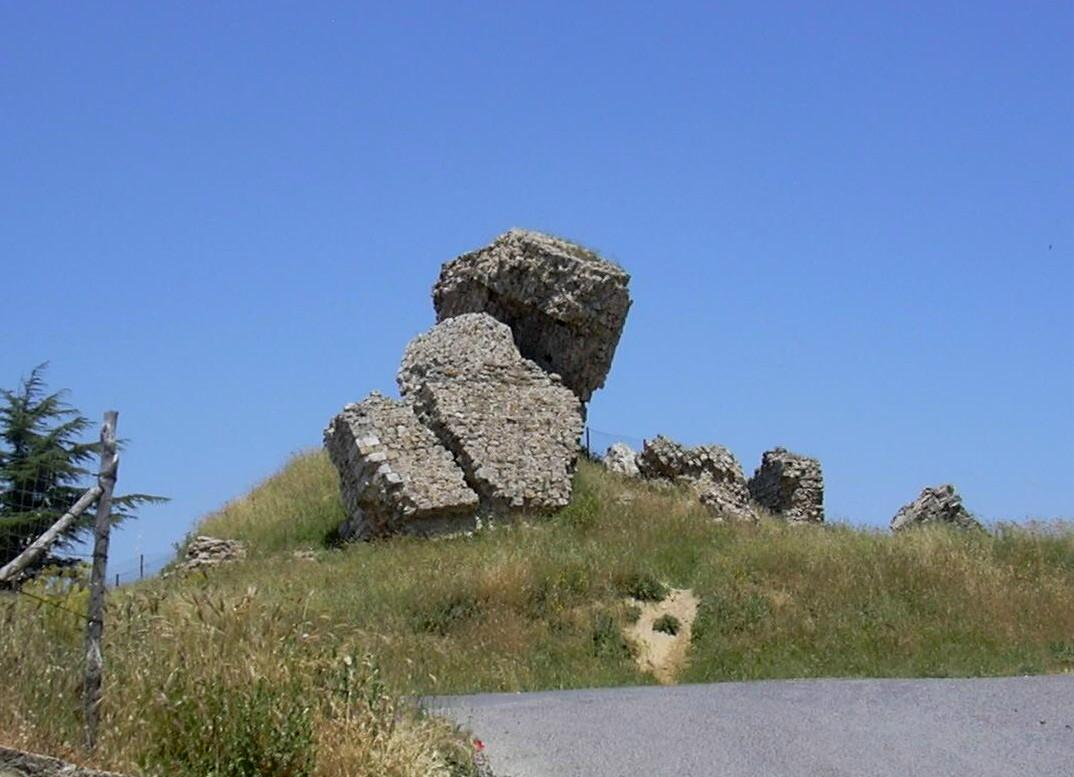 Aidone EN_Sicilia: il Castellaccio, rudere del castello medievale.